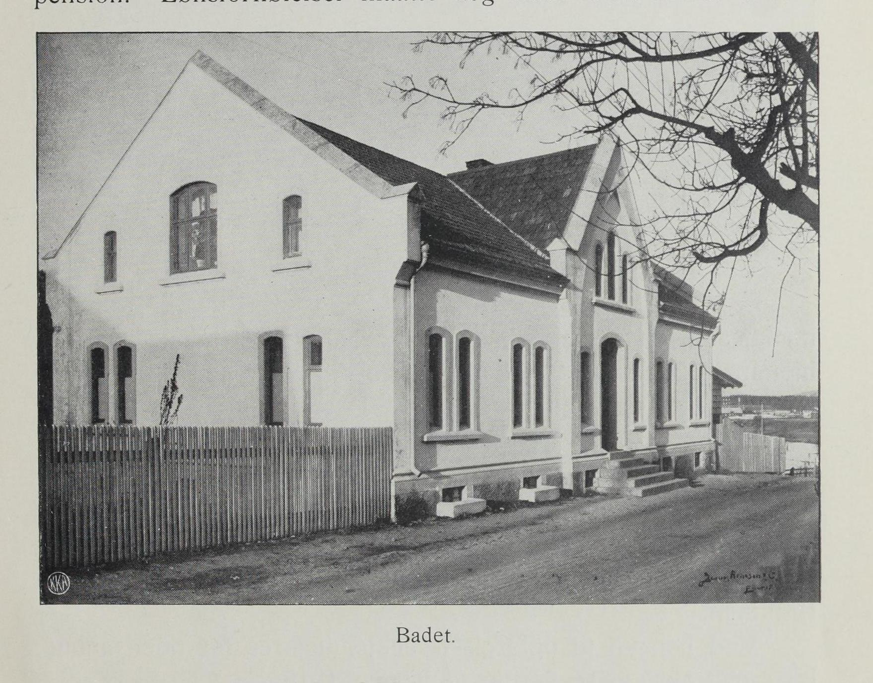 Gamle Kongsberg bad i Kirketorget 6. Illustrasjon hentet fra boken "Kongsberg" av Berg, N.G. og utgitt av (Kongsberg, 1914)